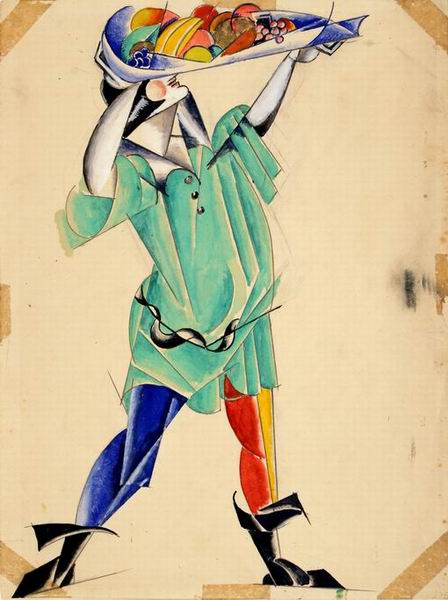 Попова Л.С. Эскиз костюма "Слуга с блюдом" к спектаклю "Ромео и Джульетта" по трагедии У.Шекспира. Камерный театр, Москва. 1920